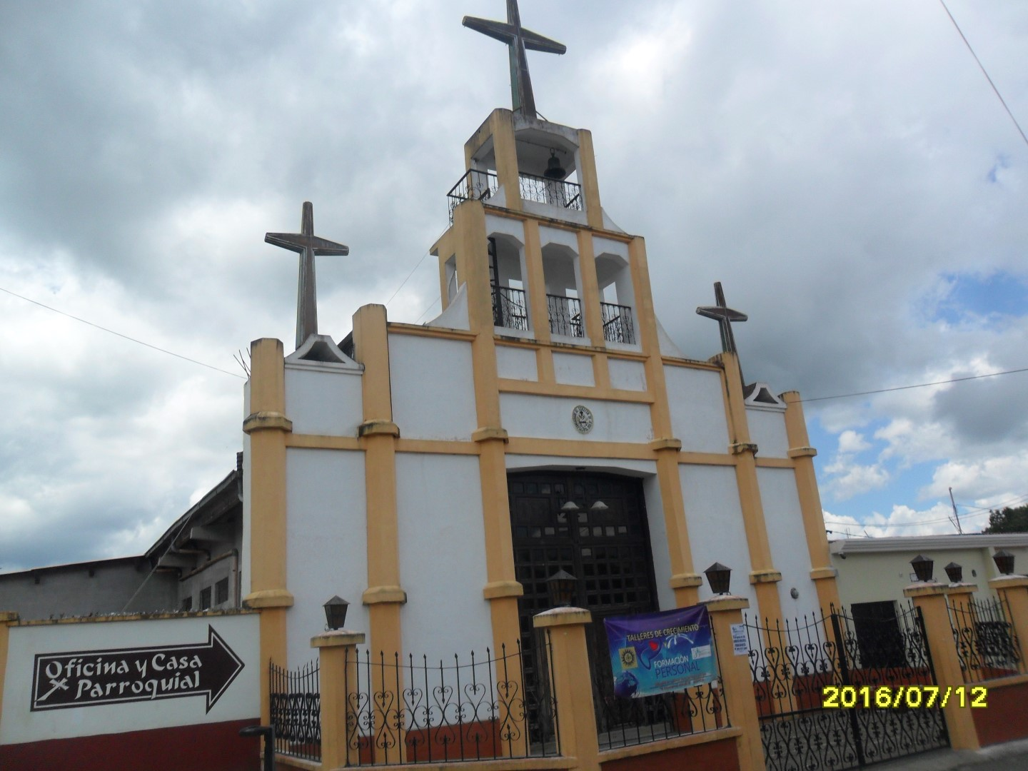 Templo religioso de Fraijanes, ubicado detrás del parque